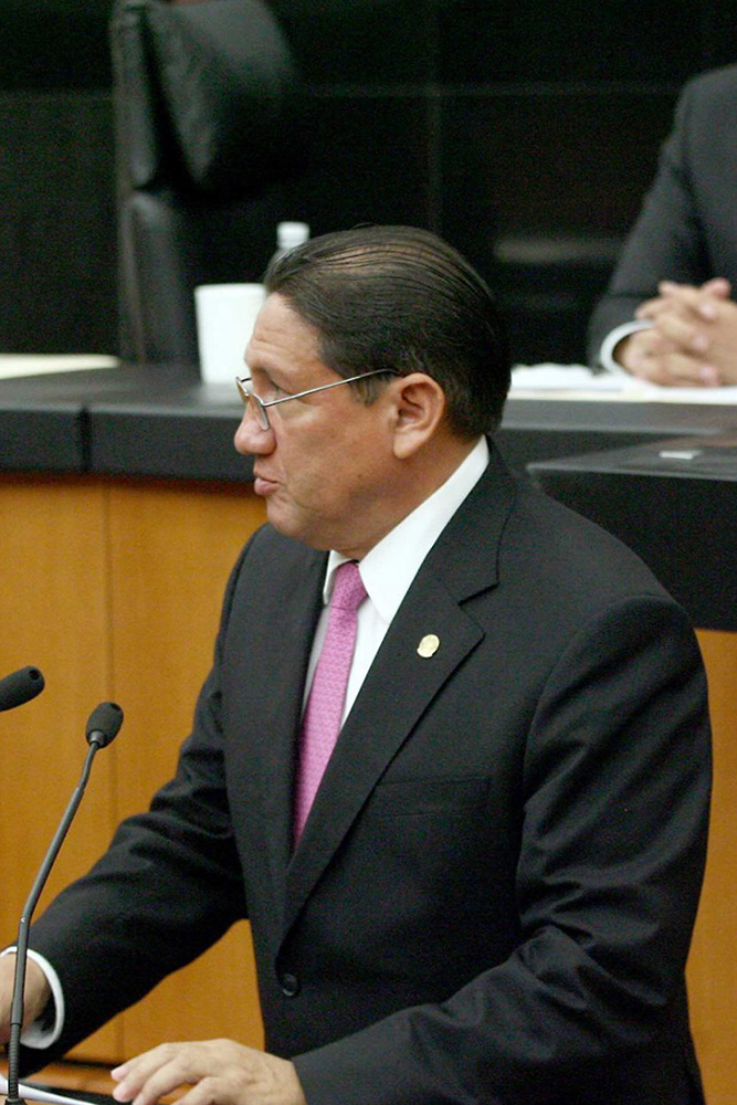 Diputado Alejandro Montano, Distrito 8 Veracruz en la tribuna de la LXII legislatura